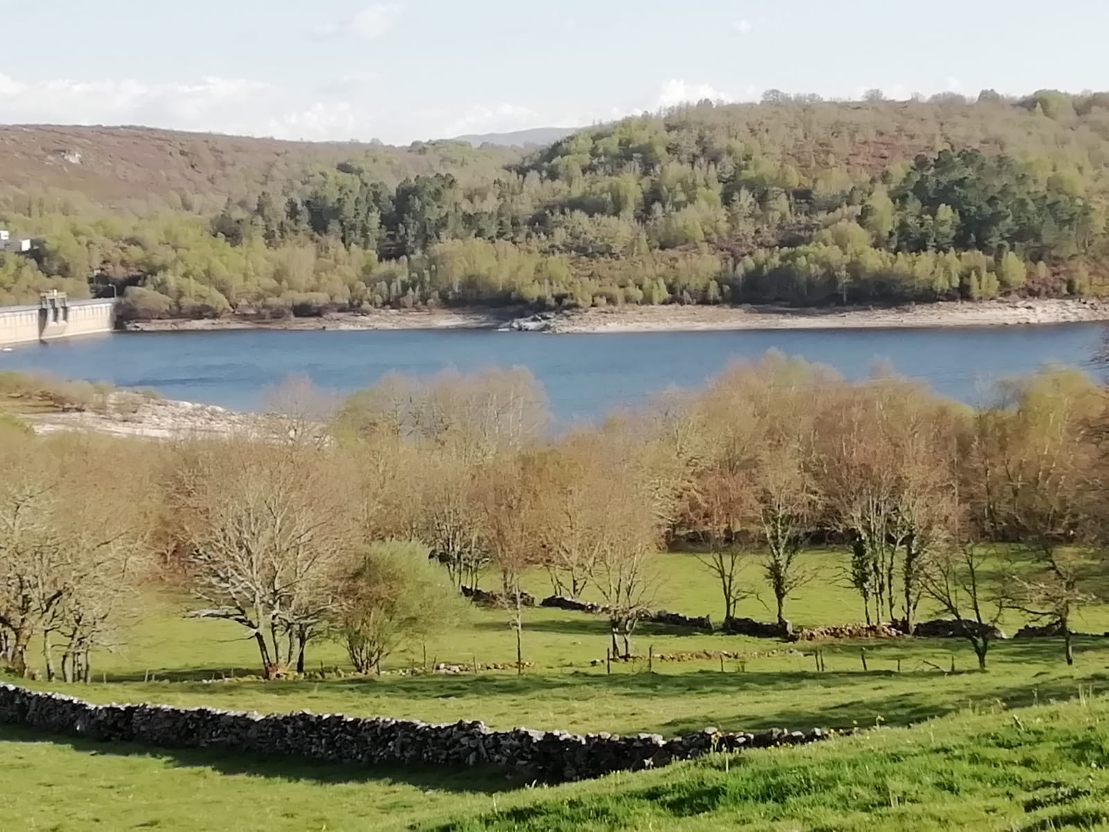 Imaxe da presa do encoro de Edrada